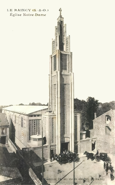 Le Raincy.Eglise Notre-Dame